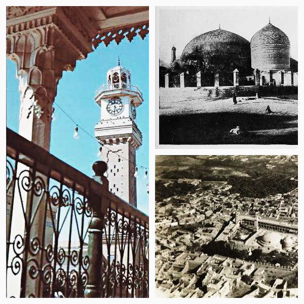 مجموعة صور للحضرة القادرية والتي كانت تسمى مدرسة باب الأزج الواقعة في جانب الرصافة في بغداد للاعوام : 1907، 1925، 1979